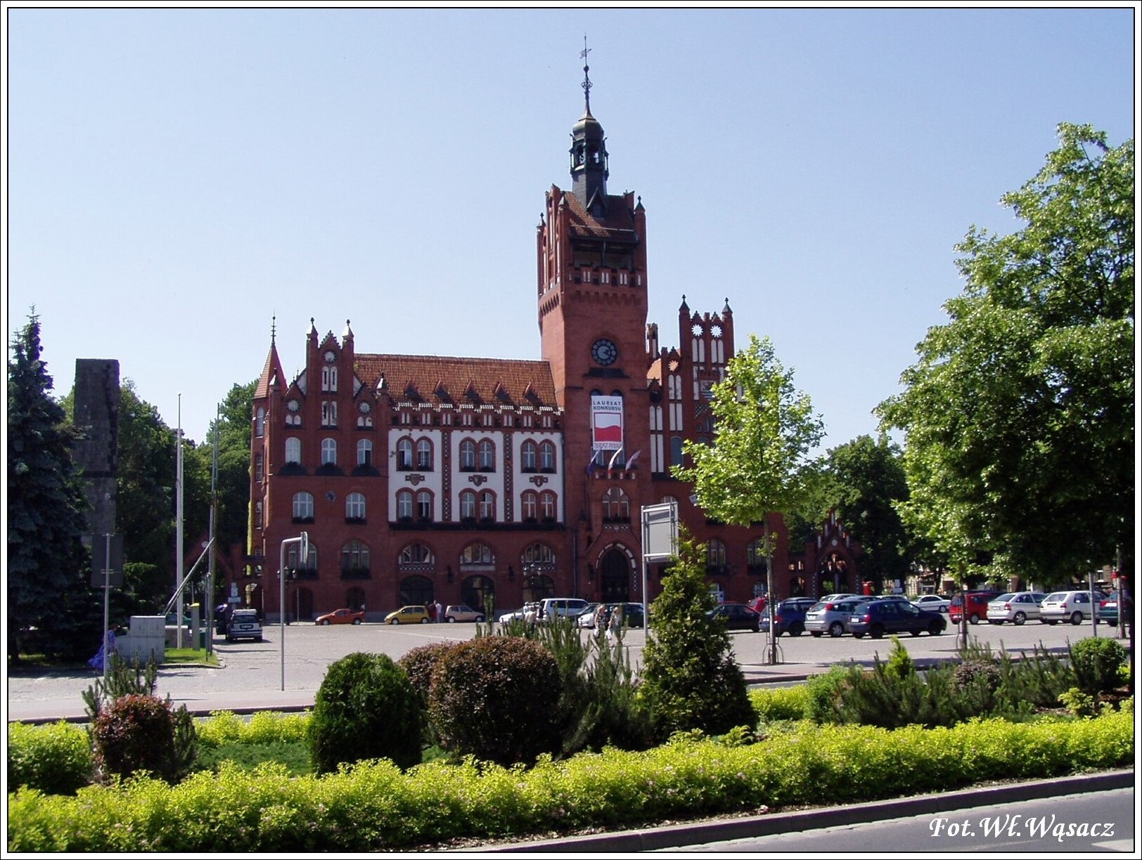 Słupsk, pl. Zwycięstwa 3 - ratusz, 1899-1901